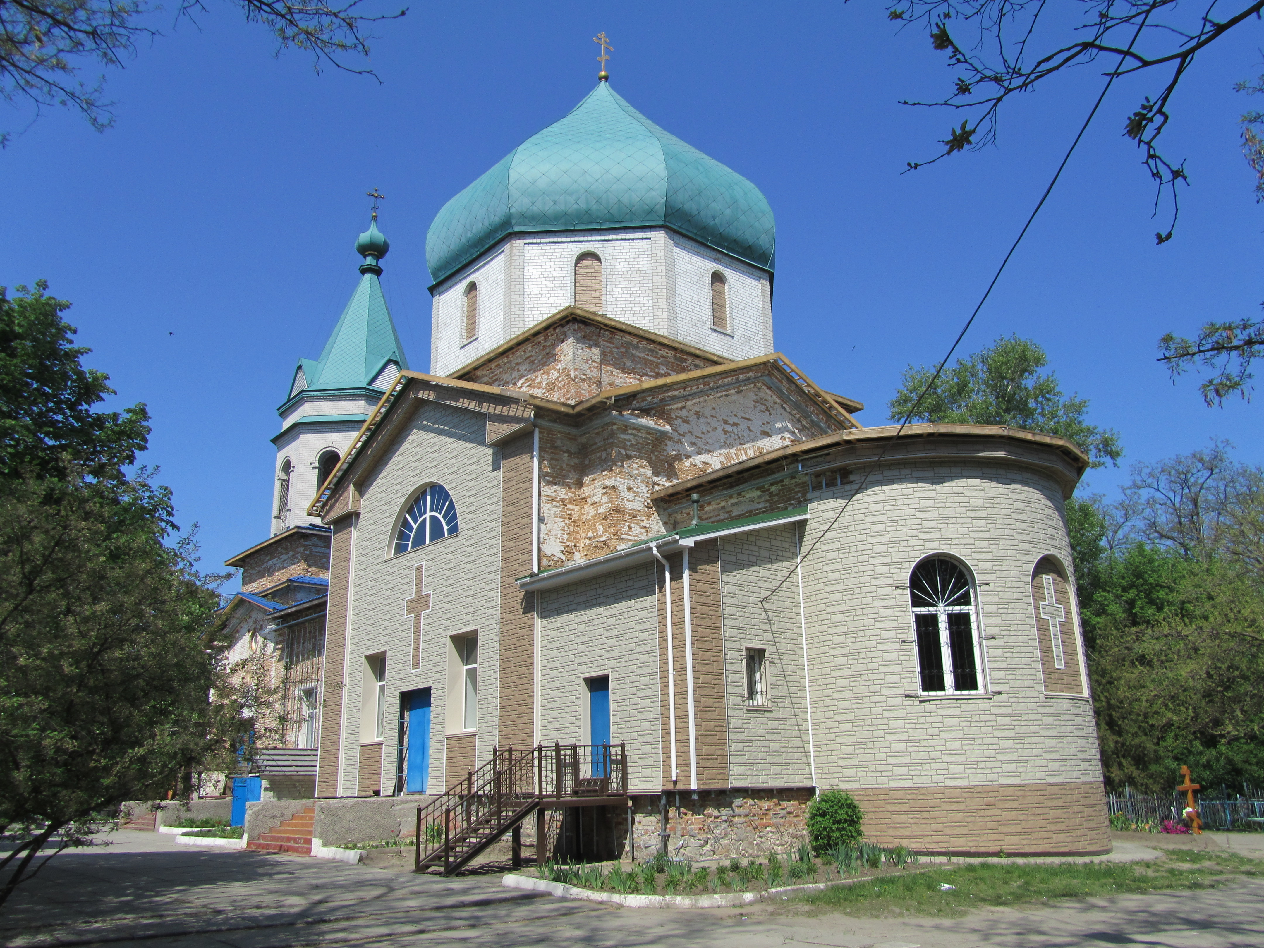 Церква Успіння Божої Матері, Кременчук, Вул. Макаренка, 107